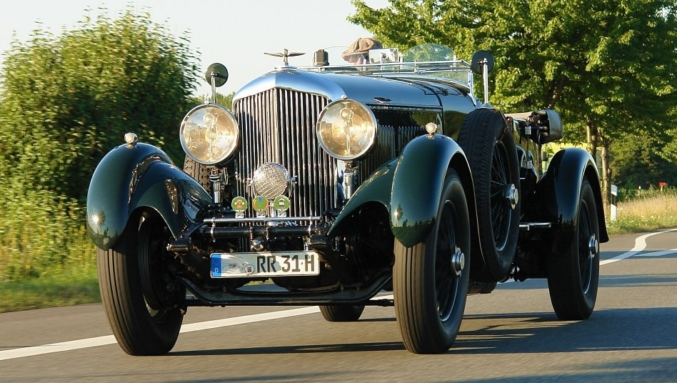 Bentley 8-litre 1930 Note: Its 4-door saloon body by Mulliner has been replaced by a (21st century) tourer replica